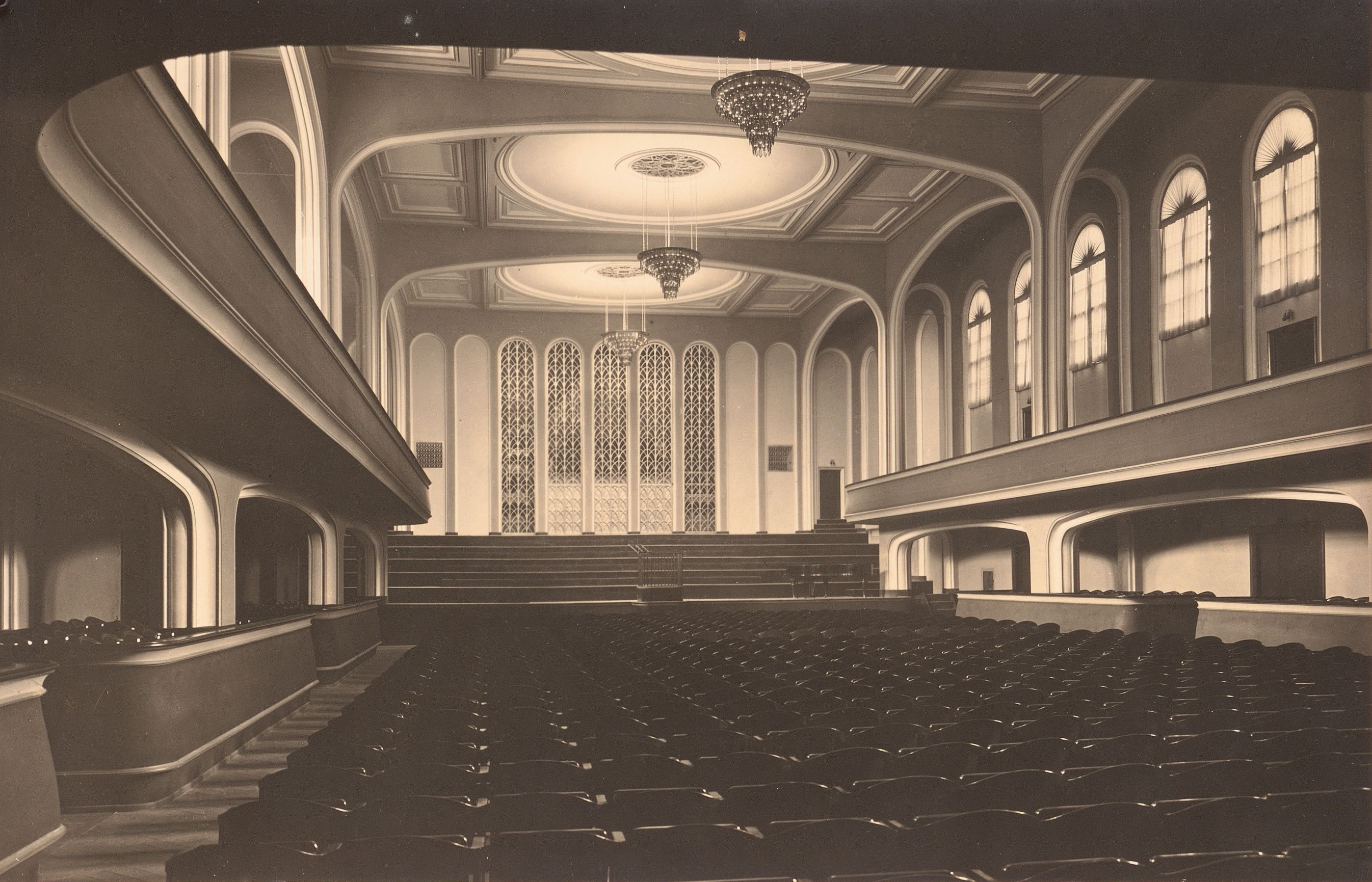 Innenansicht des Konzerthauses in Breslau, ca. 1925.